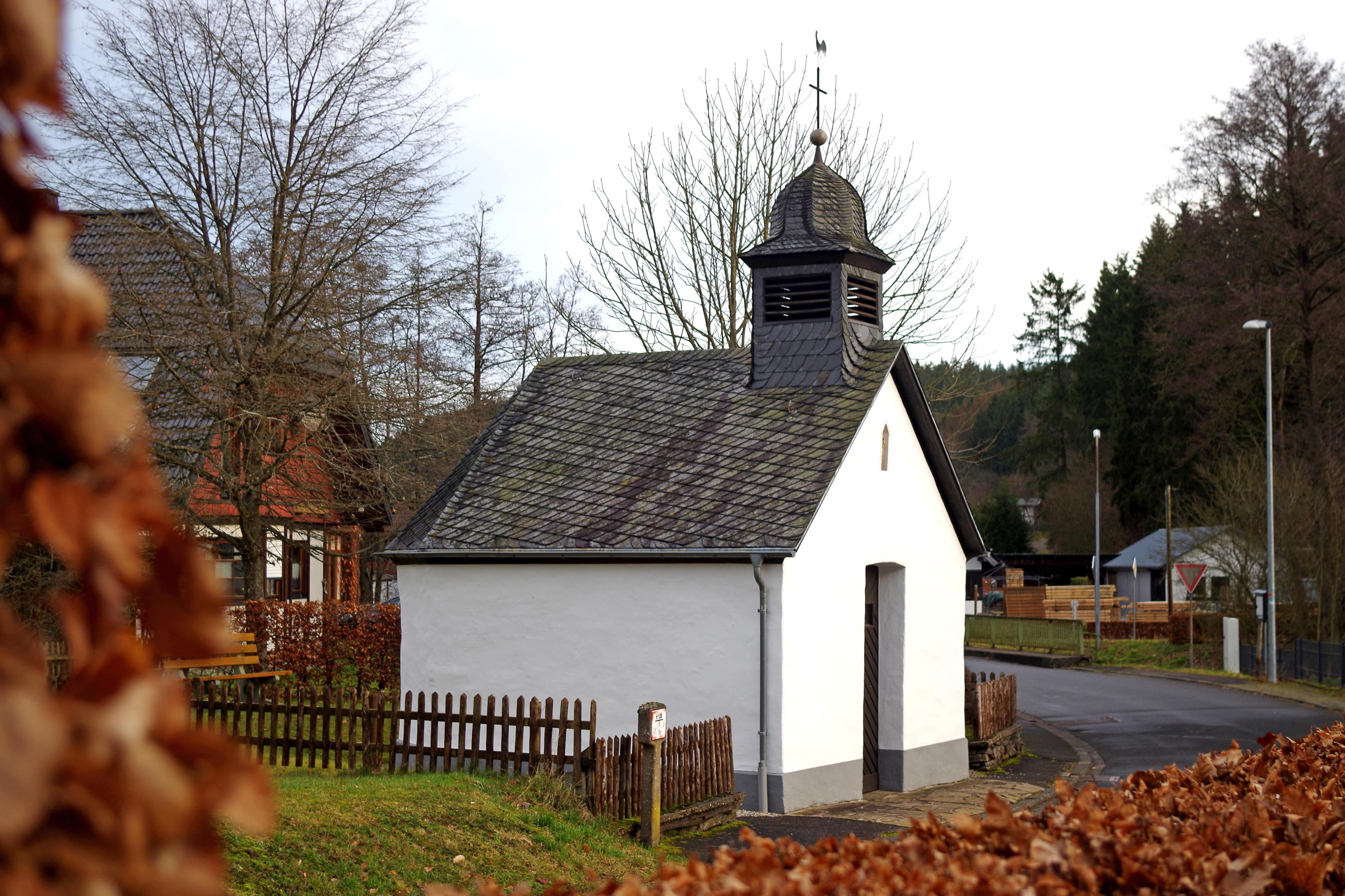 Marienkapelle (Wiesen), Westseite